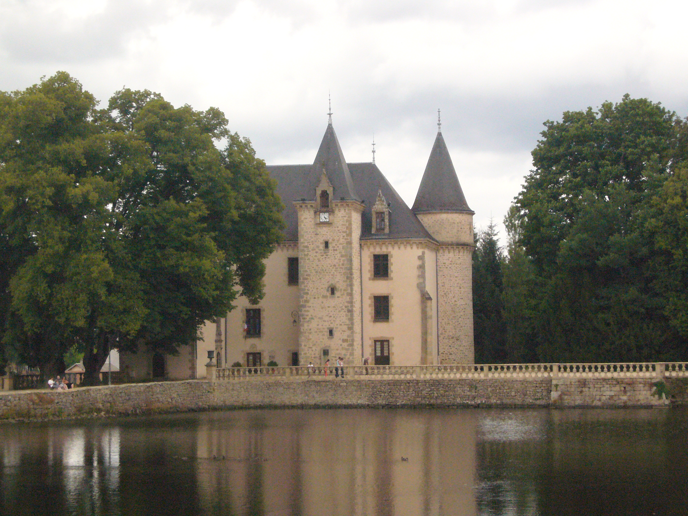 Le château de Nieul (Haute-Vienne, France)